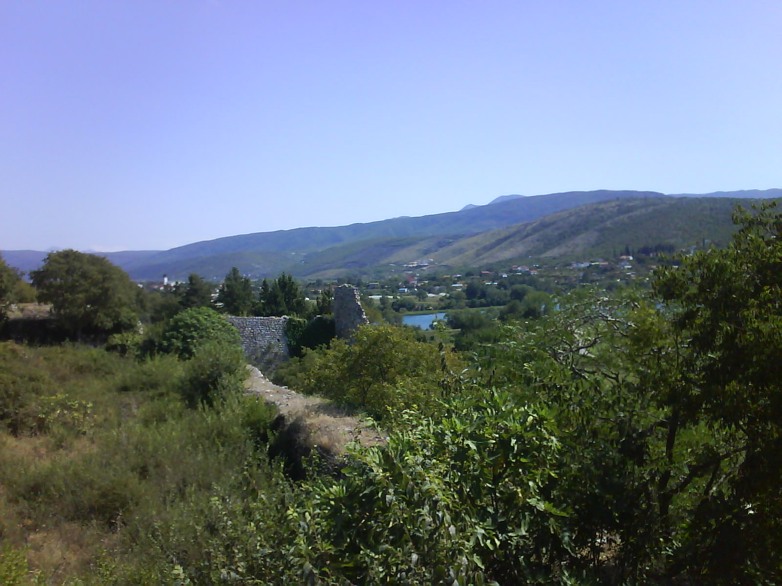 kuline